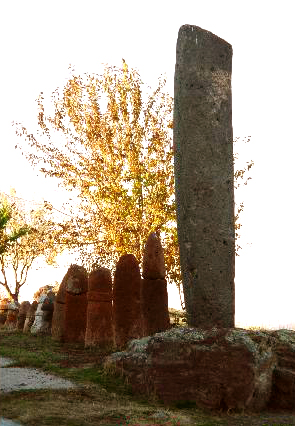 Մեծամոր